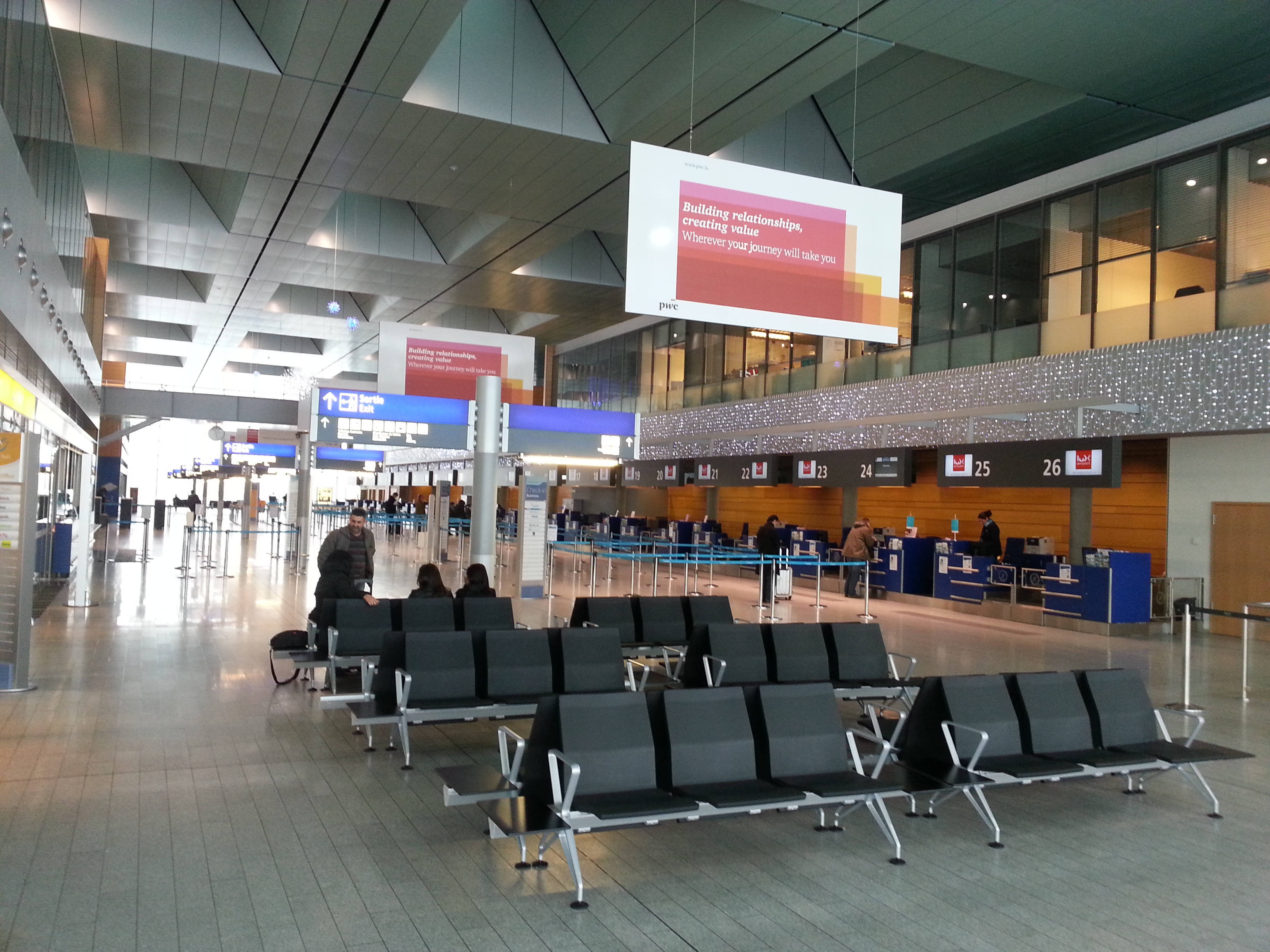 Flughafen Luxembourg, Check-In Schalter